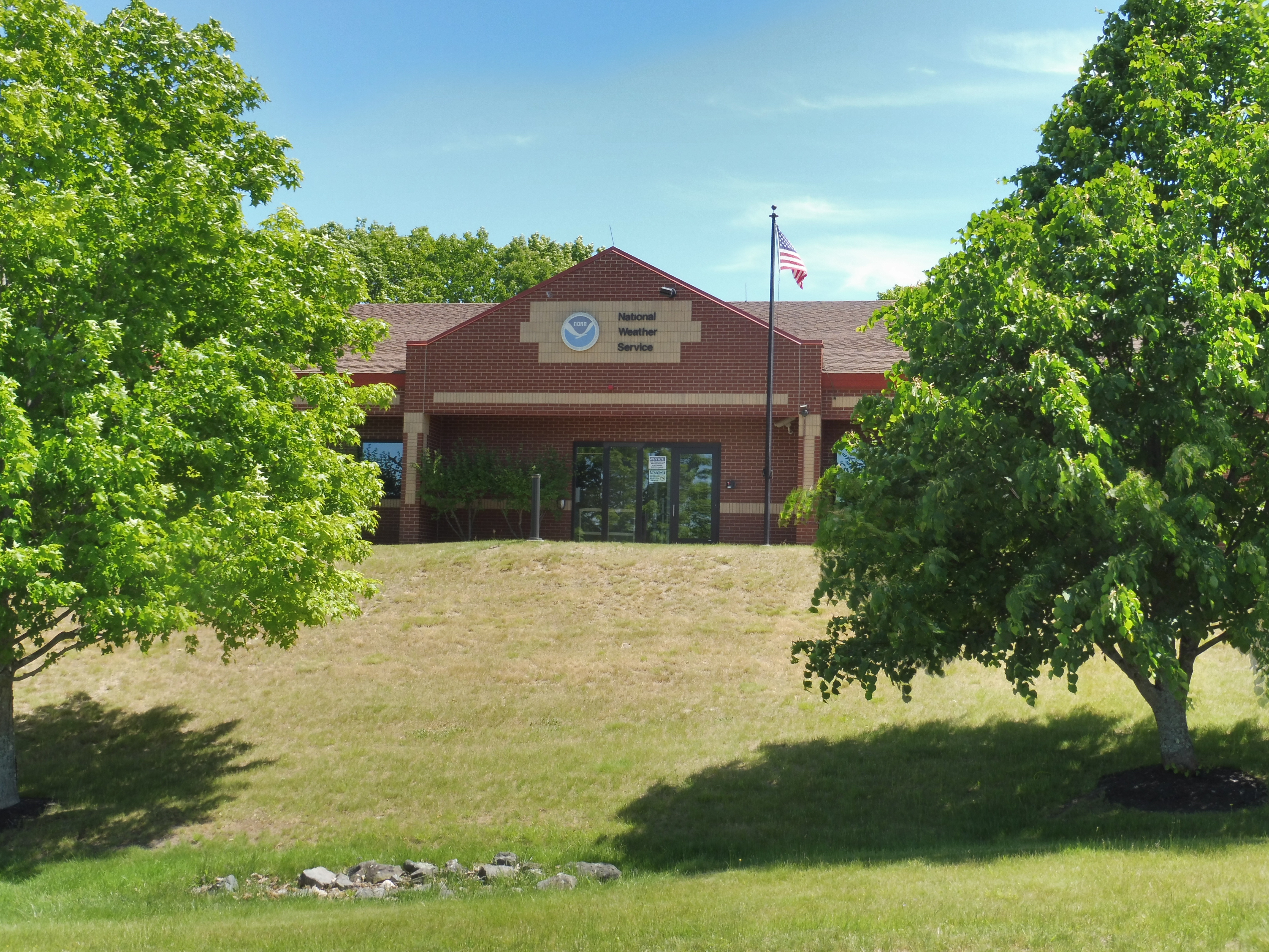 Second front view of the NWS office at 1 Weather Lane Gray, ME 04039 beside the Pineland Farms Equestrian Center.